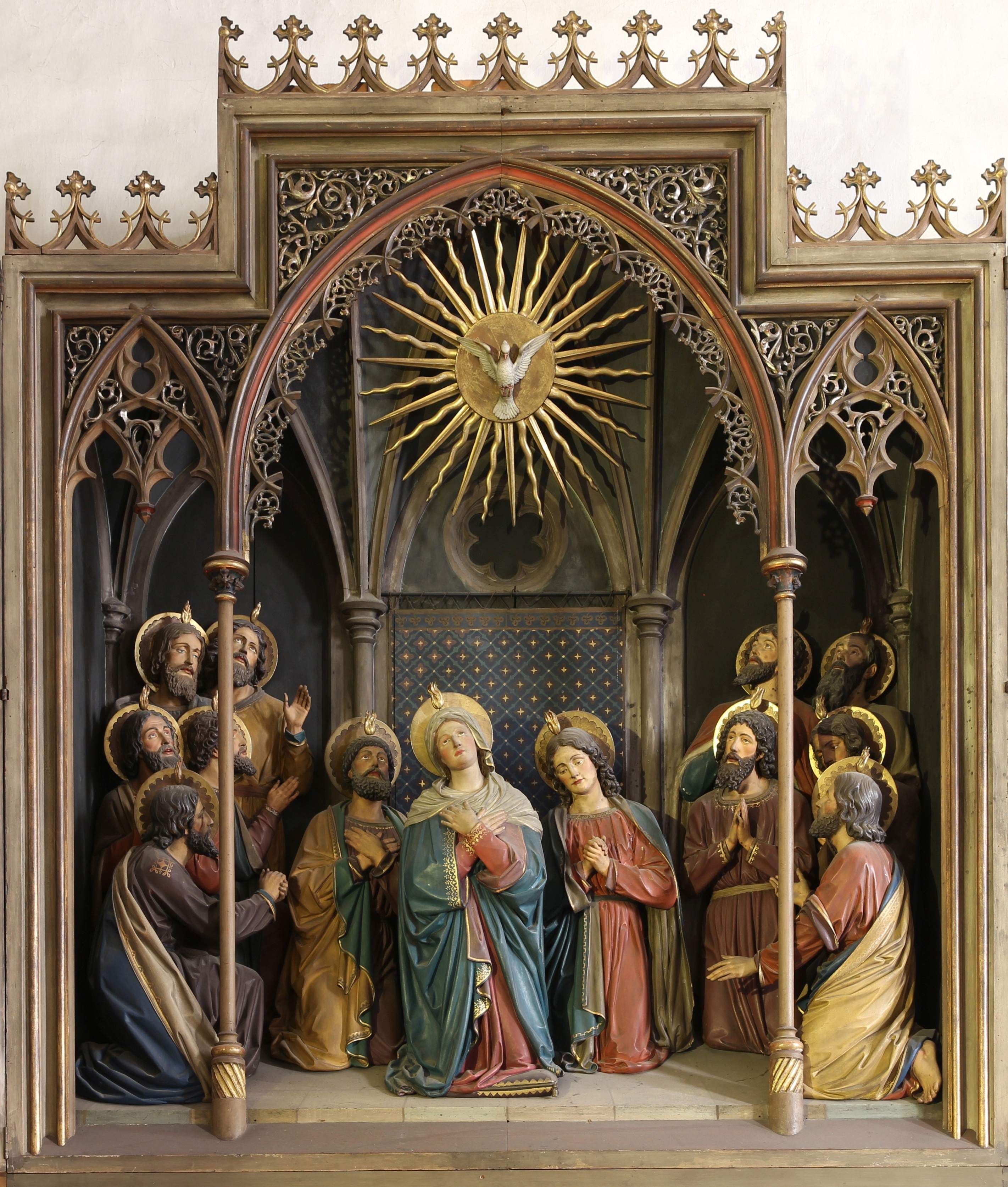 Spätgotischer Altar von Franz Xaver Pendl in der Spitalkirche zum Heiligen Geist, Meran